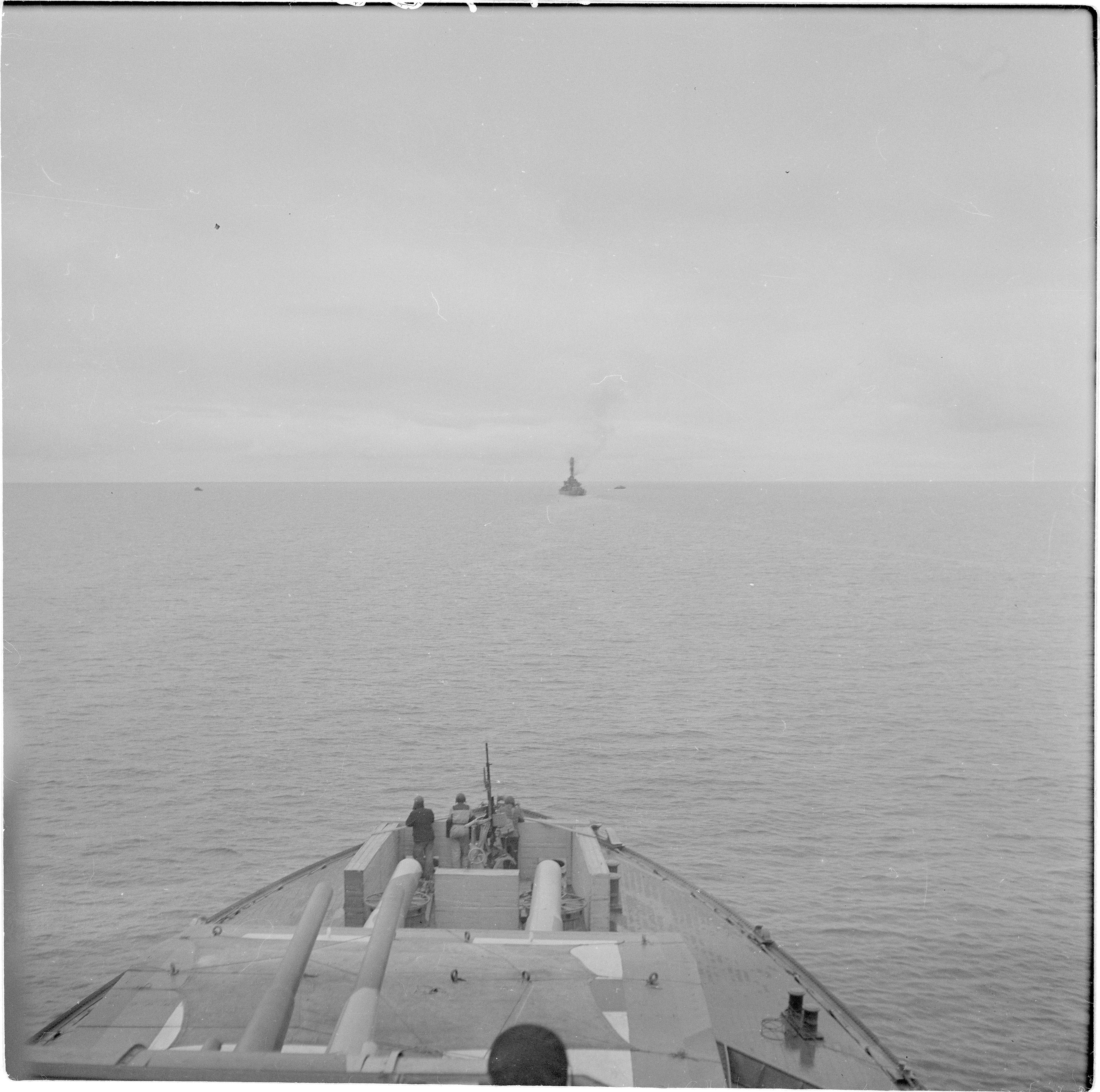 Panssarilaiva Ilmarinen. Kuva otettu Väinämöisen sillalta noin tuntia ennen Ilmarisen uppoamista.